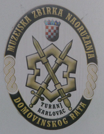 Amblem Muzejska zbirka naoružanja iz Bomovinskog rata u Turnju, Karlovac